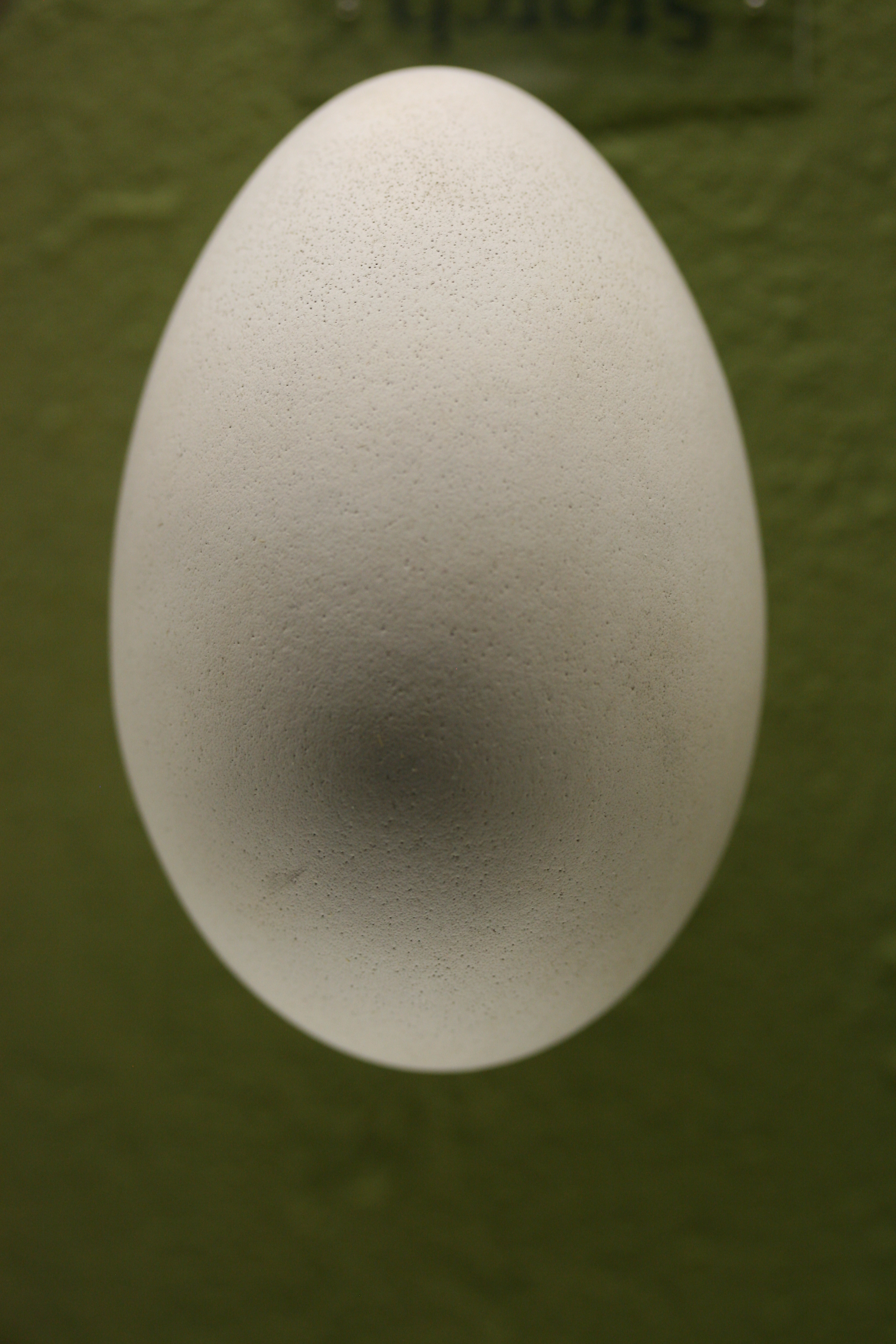 Ei eines Storches